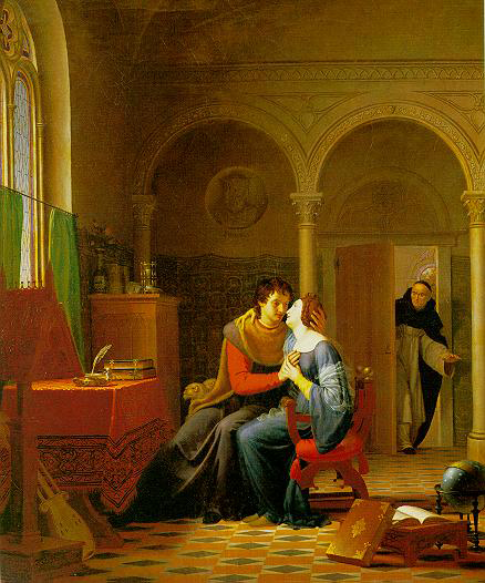 detail